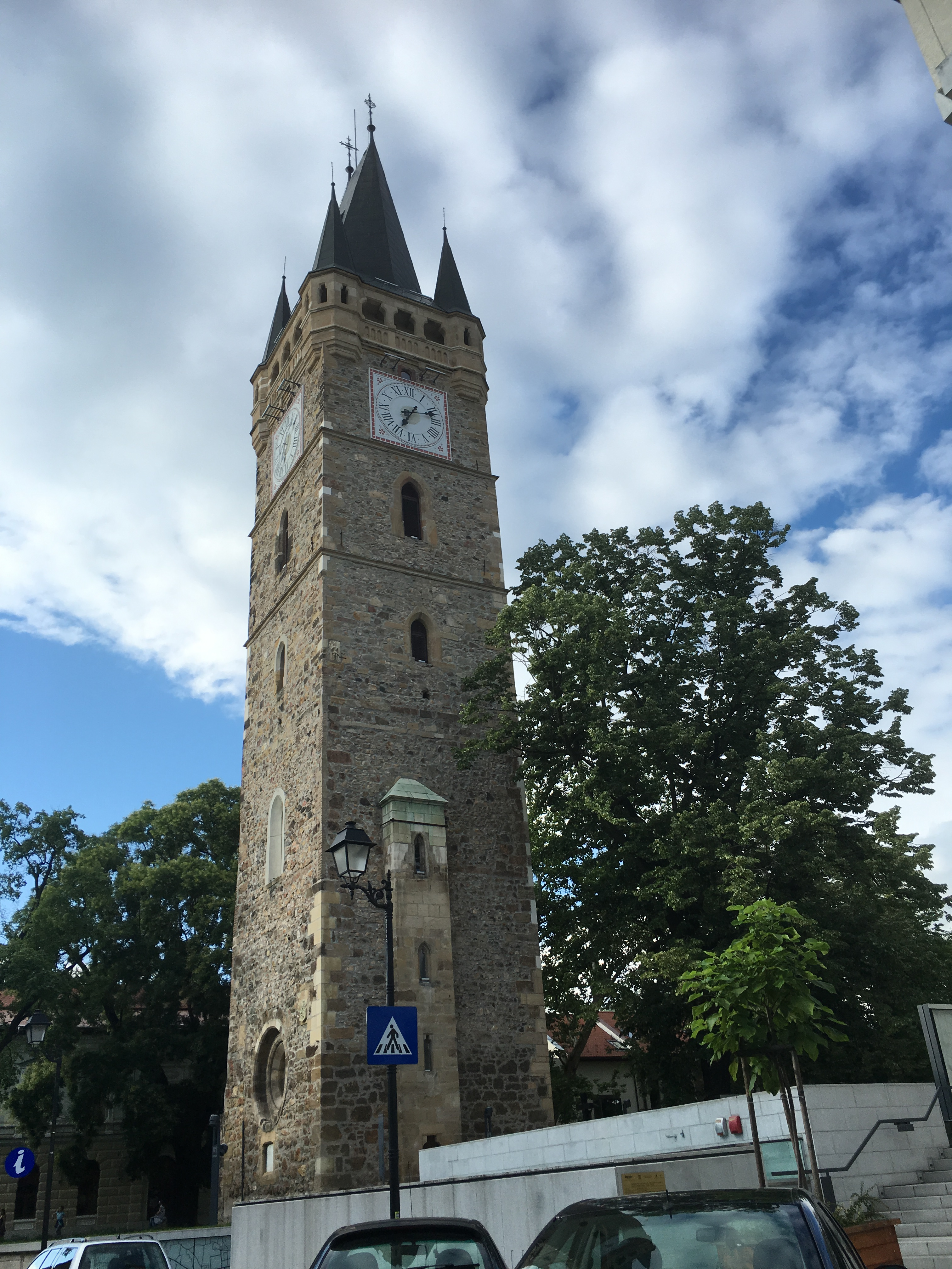 Stefans tårnet i Baia Mare